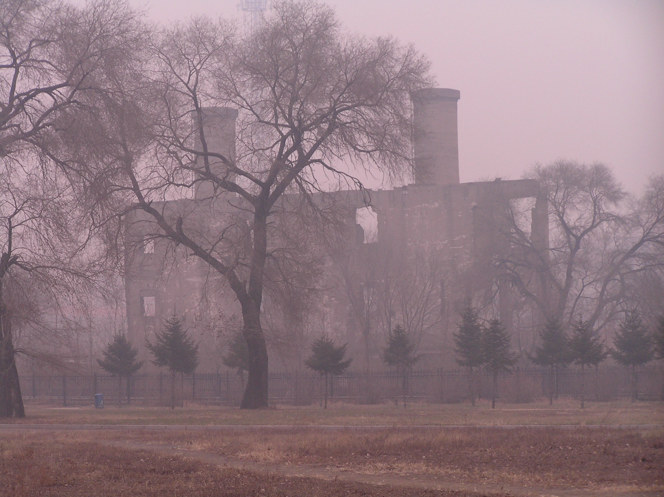 Building on the site of the Harbin bioweapon facility of Unit 731 関東軍防疫給水部本部731部隊（石井部隊） 日軍第731部隊旧址